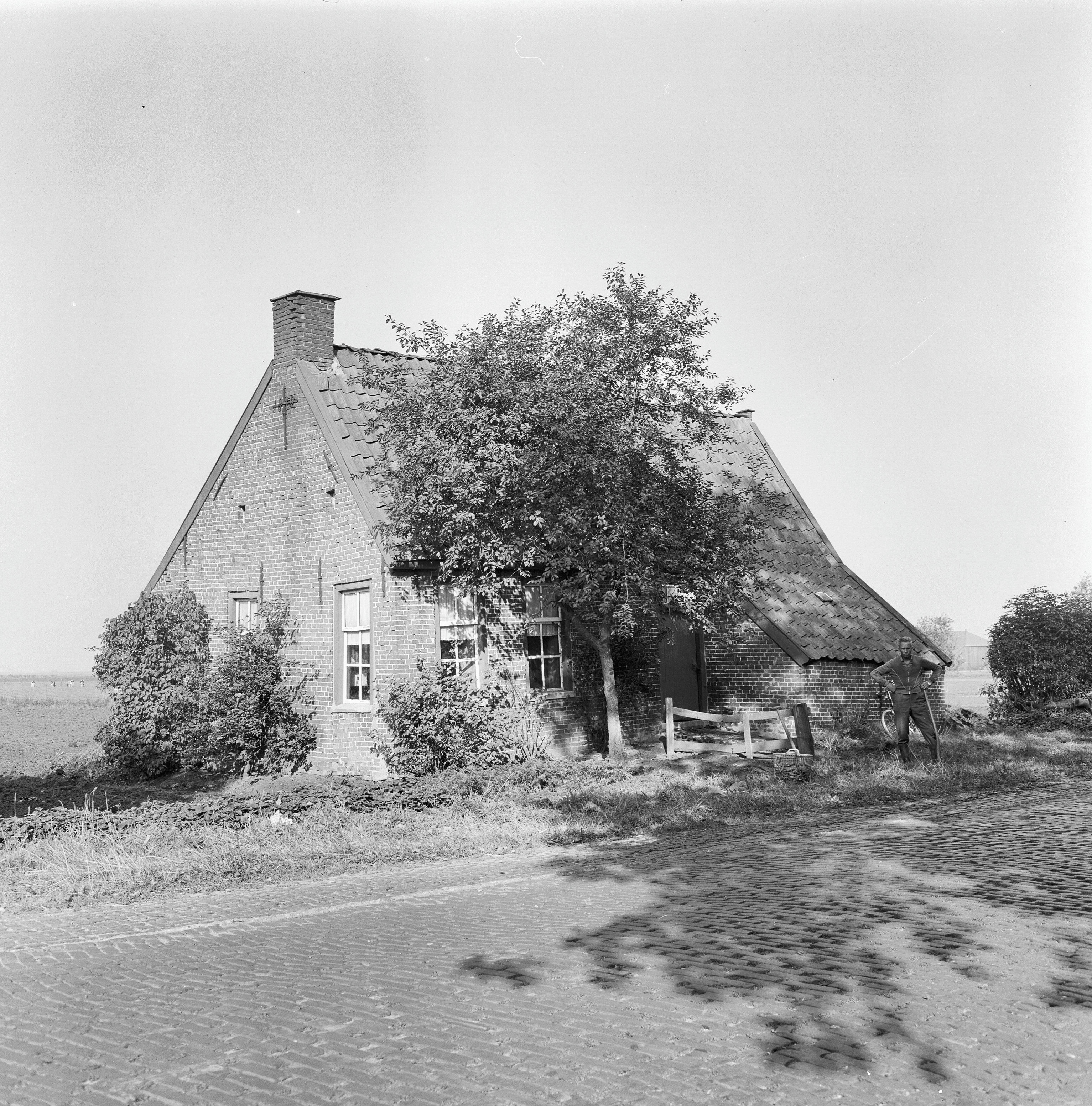 aanzicht